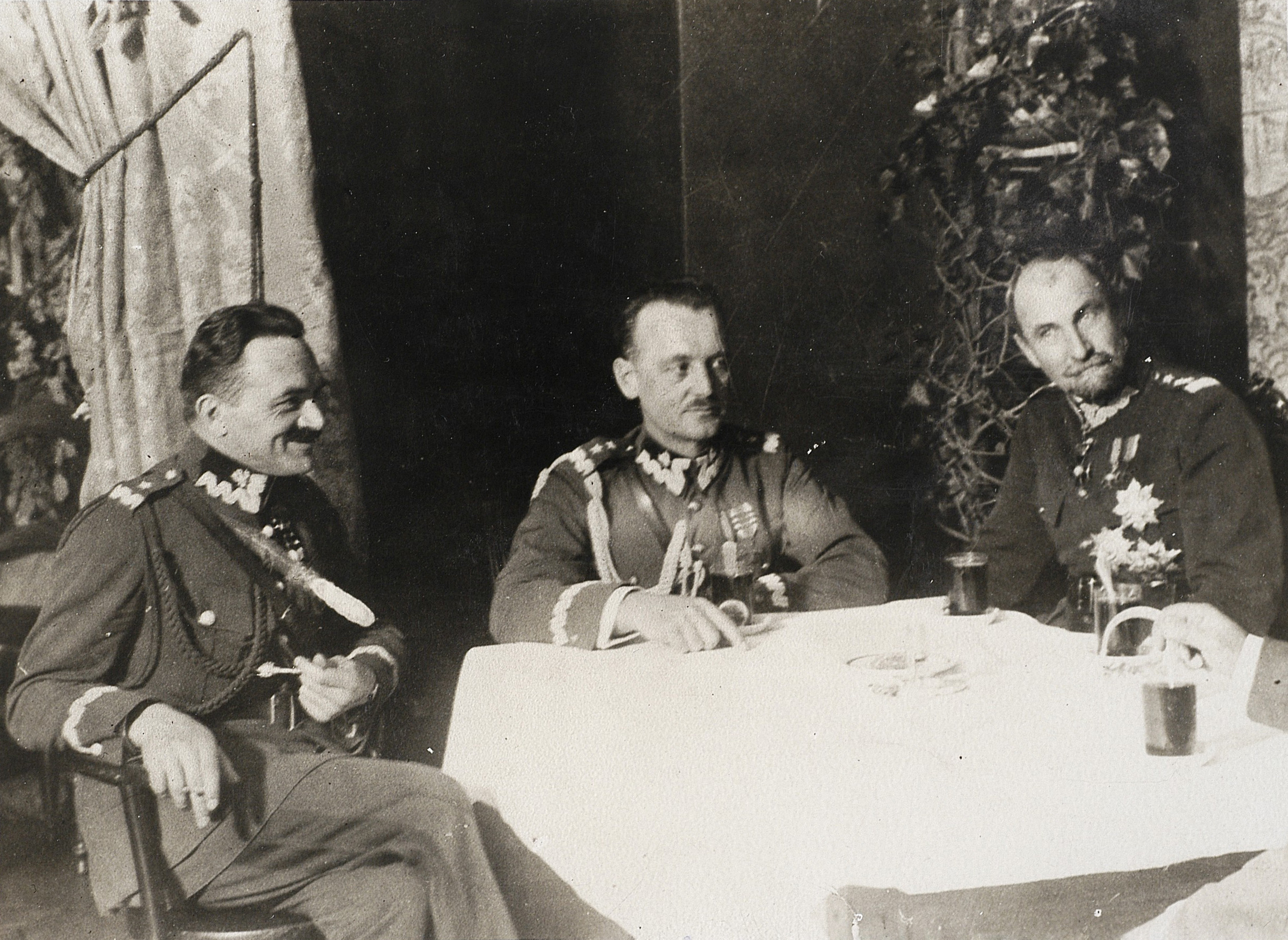 Generałowie Włodzimierz Zagórski, Władysław Sikorski i Tadeusz Rozwadowski podczas balu lotników.